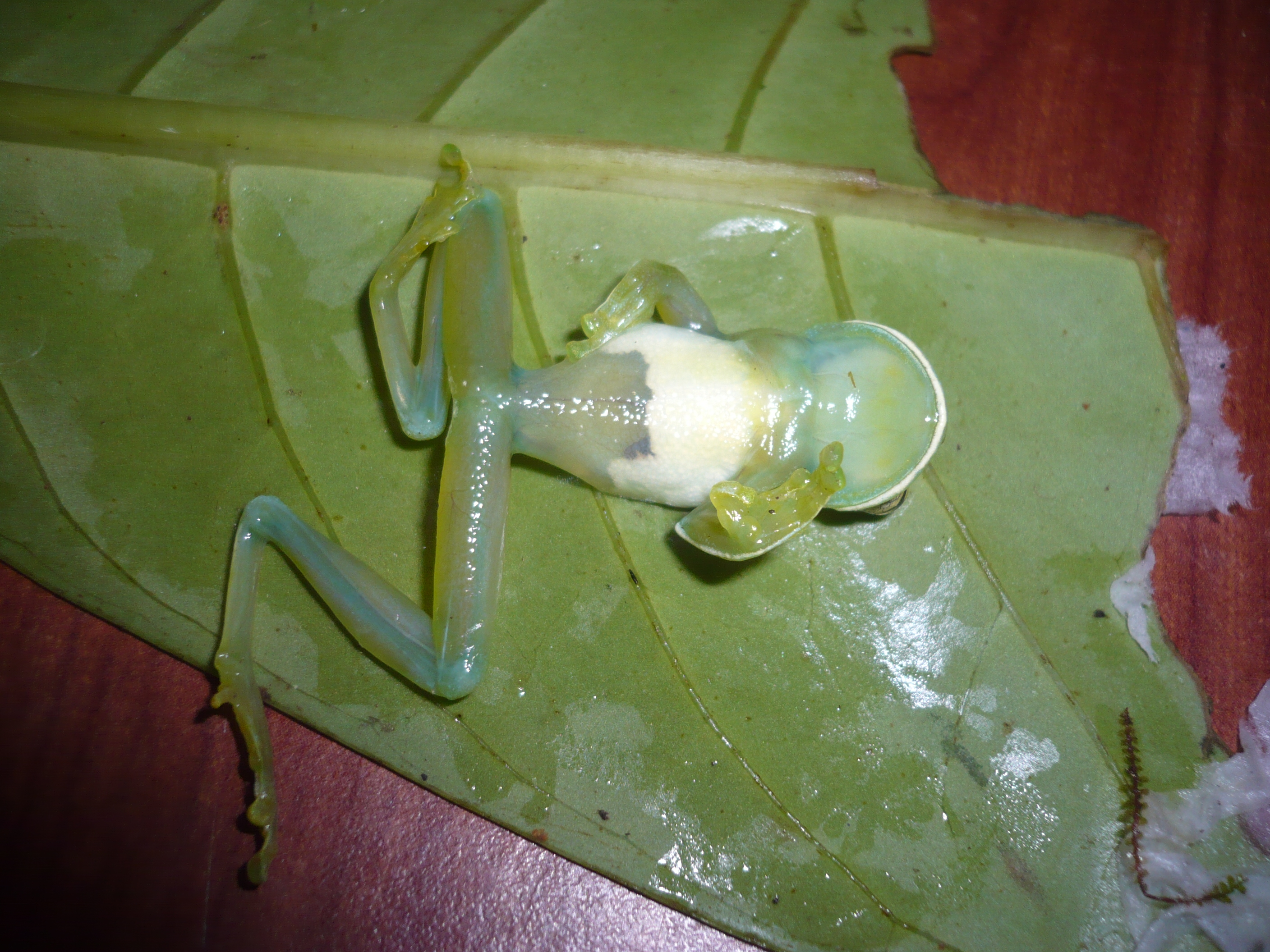 Cochranella nola en el Parque Nacional del Manu.